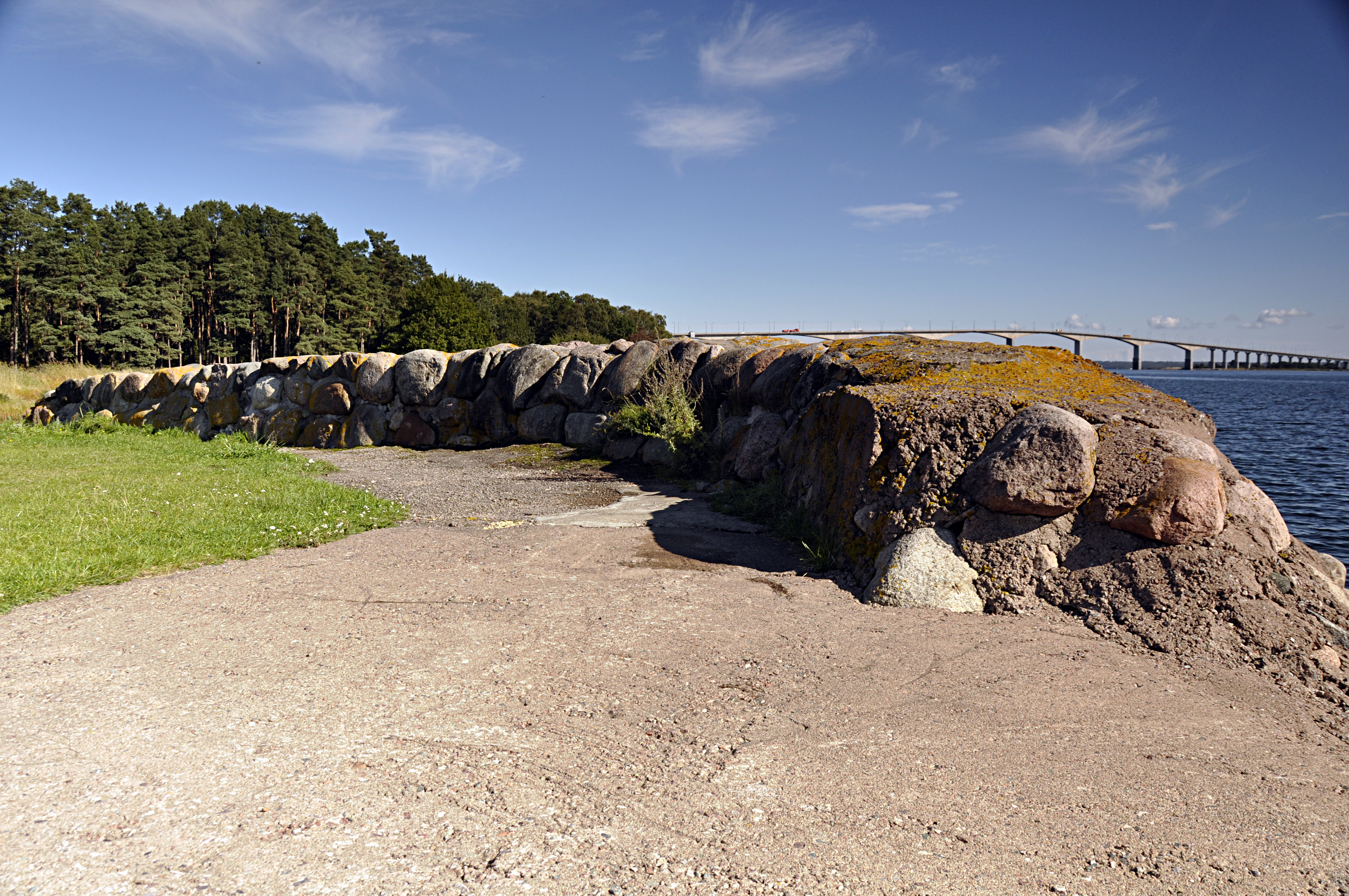 Svinö skans (Kalmar 28:1)